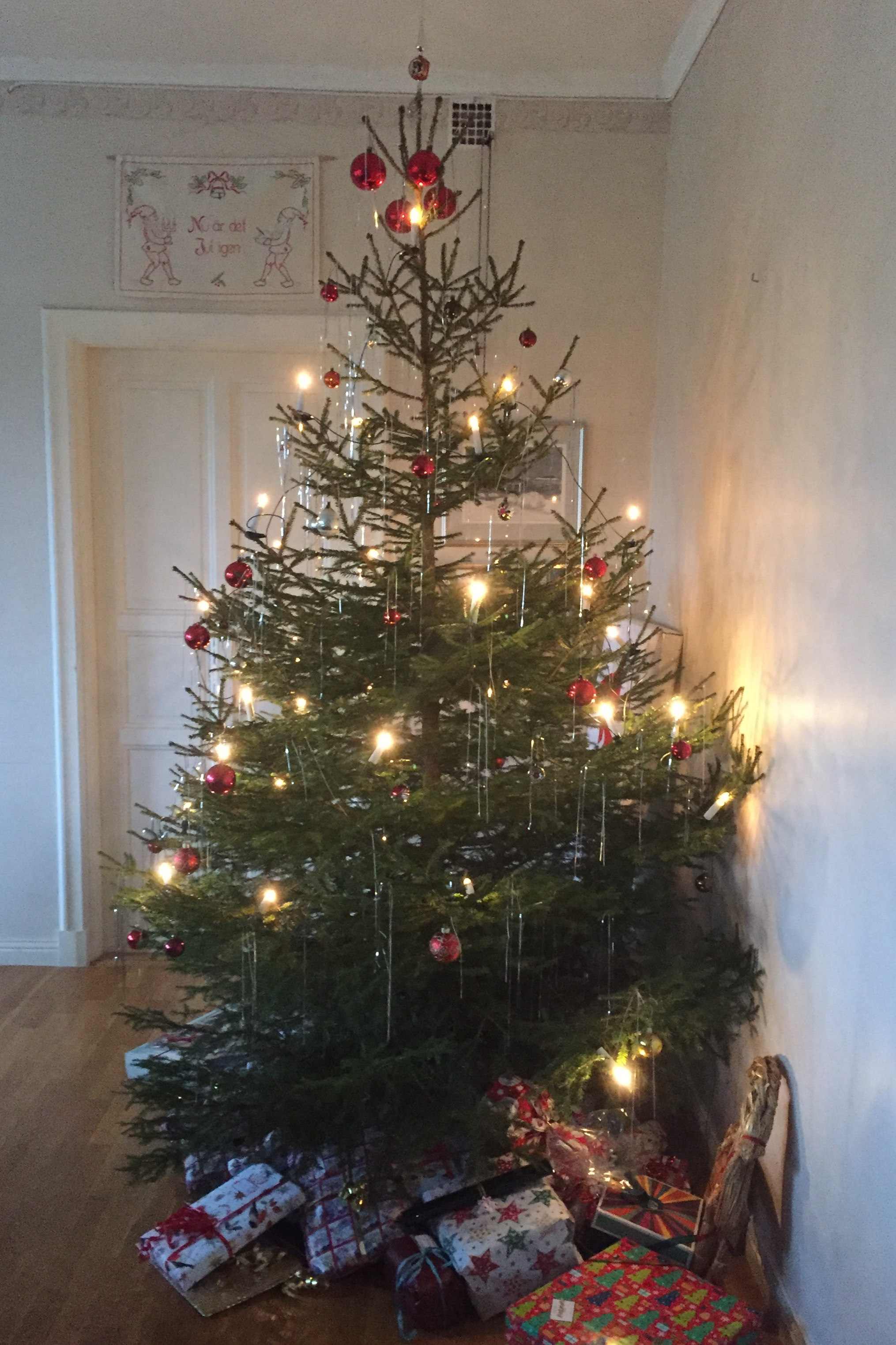 Gammaldags julgran